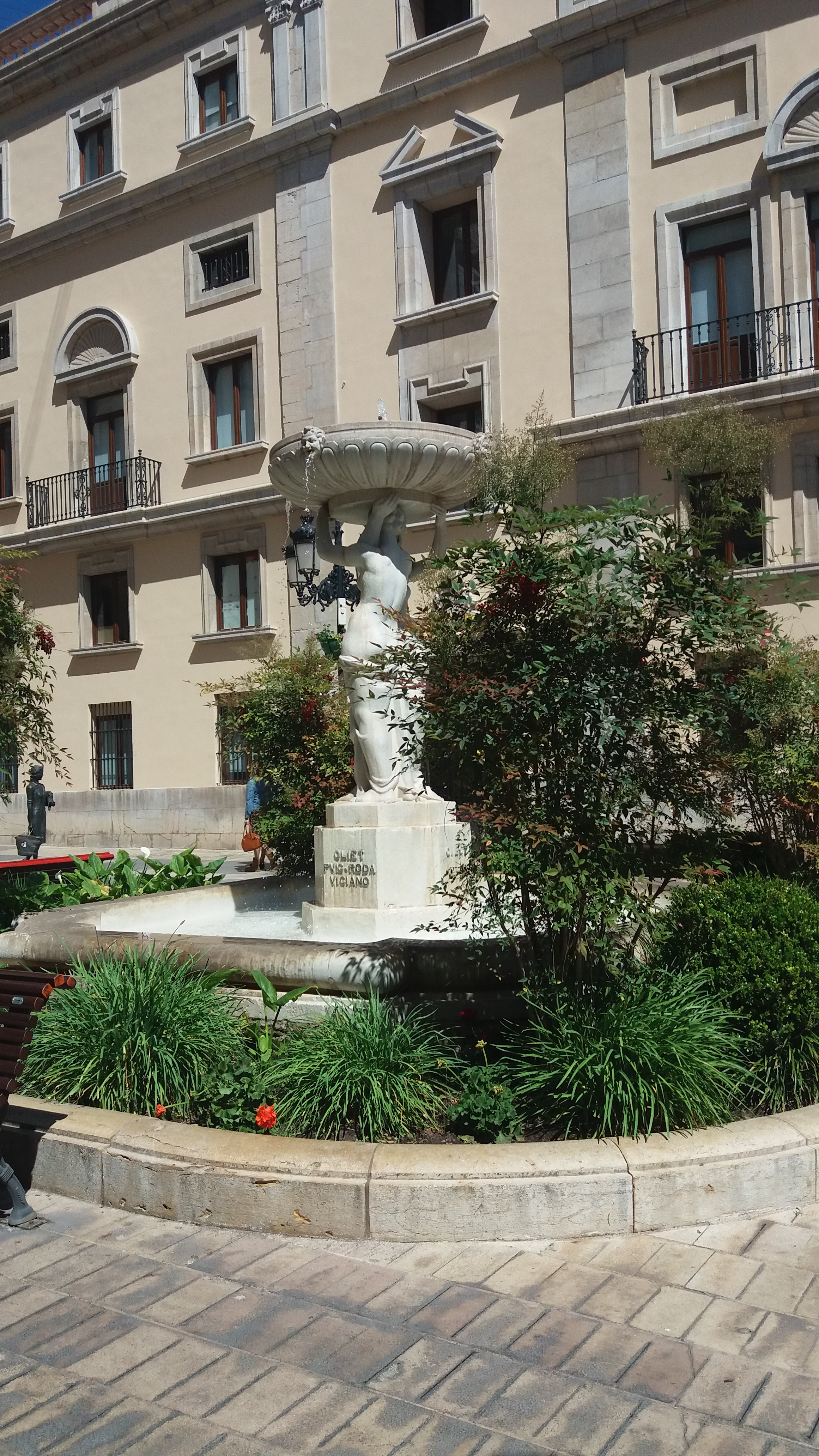 Es la fuente que está en dicha plaza.